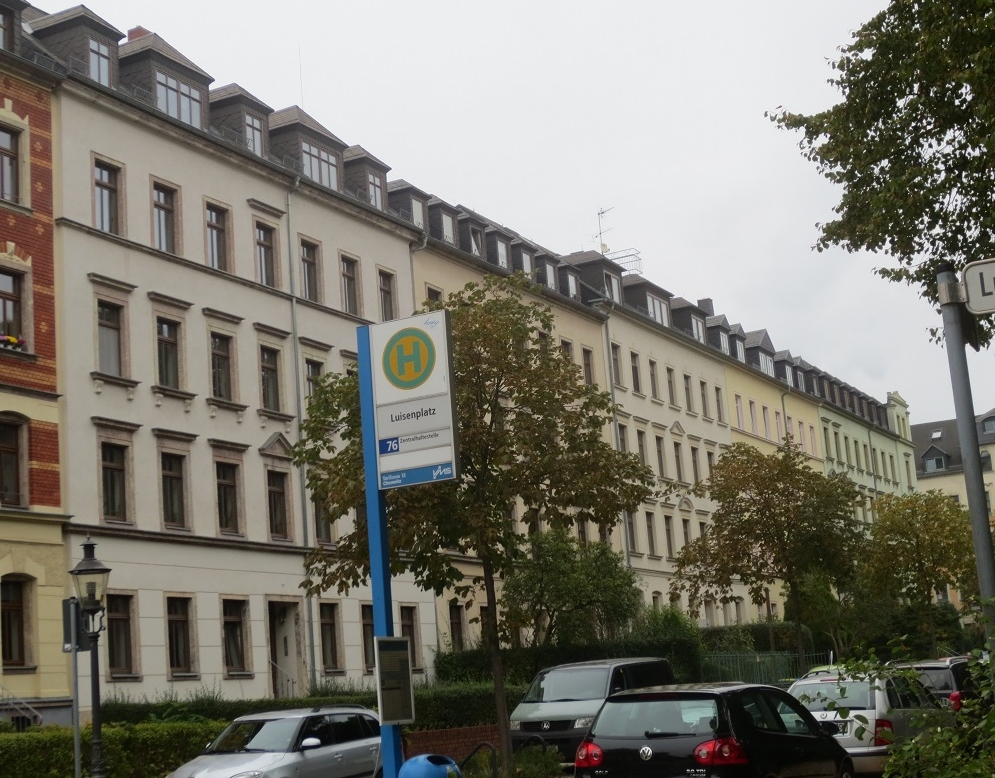 Wohnhaus Zeile mit Geschäften im EG Bereich.